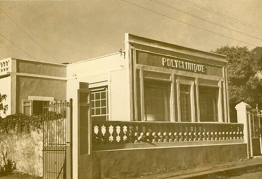 Polyclinique du Dr Achille Berg à Saint-Denis (Réunion), dans les années 1940-50. (Source : Famille Berg).